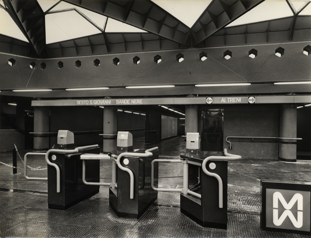 Stazione di Amendola-Fiera della metropolitana di Milano, i tornelli nel mezzanino, poco prima dell'apertura.